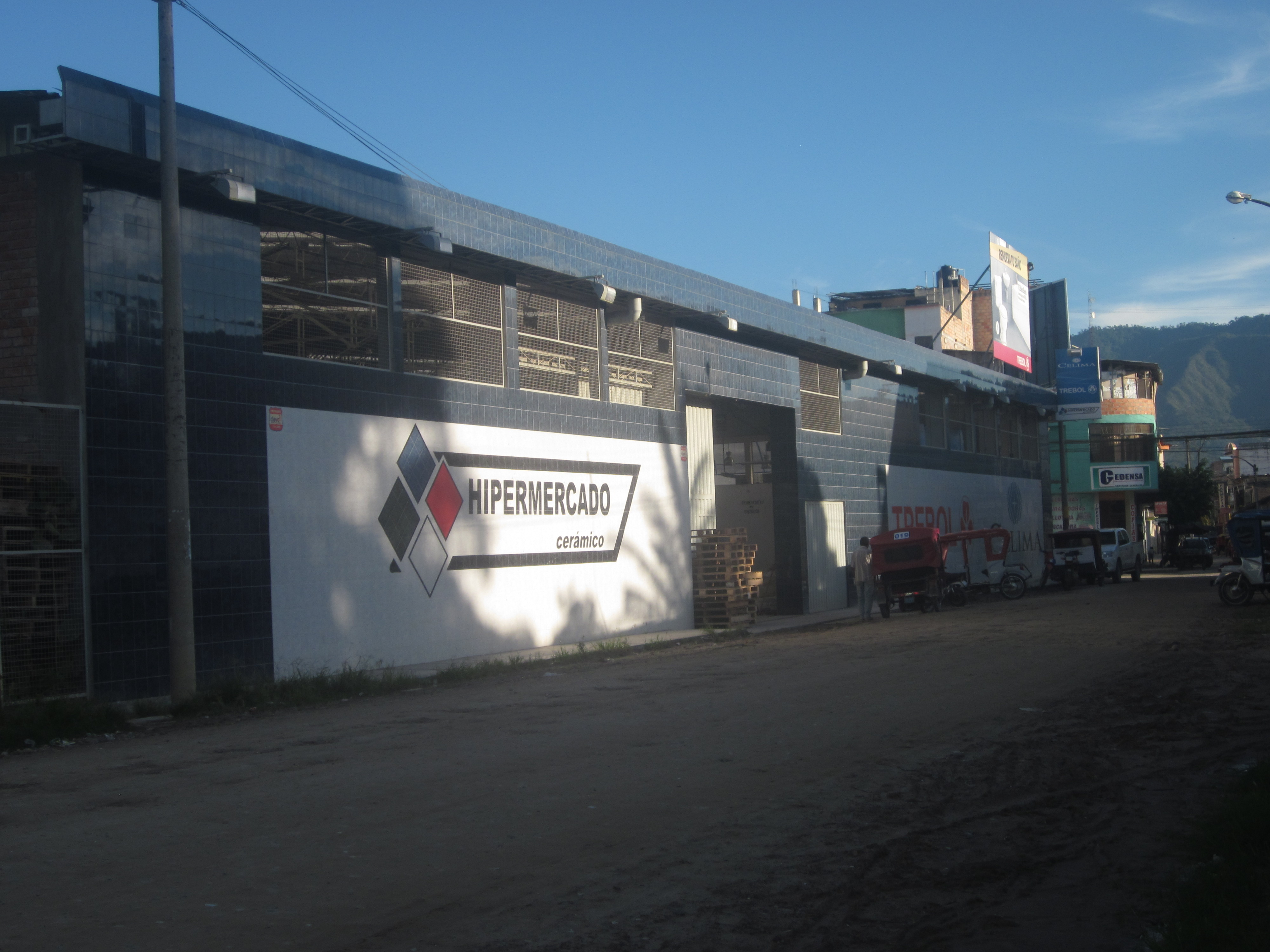 Primer Hipermercado en la region San Martin en Moyobamba